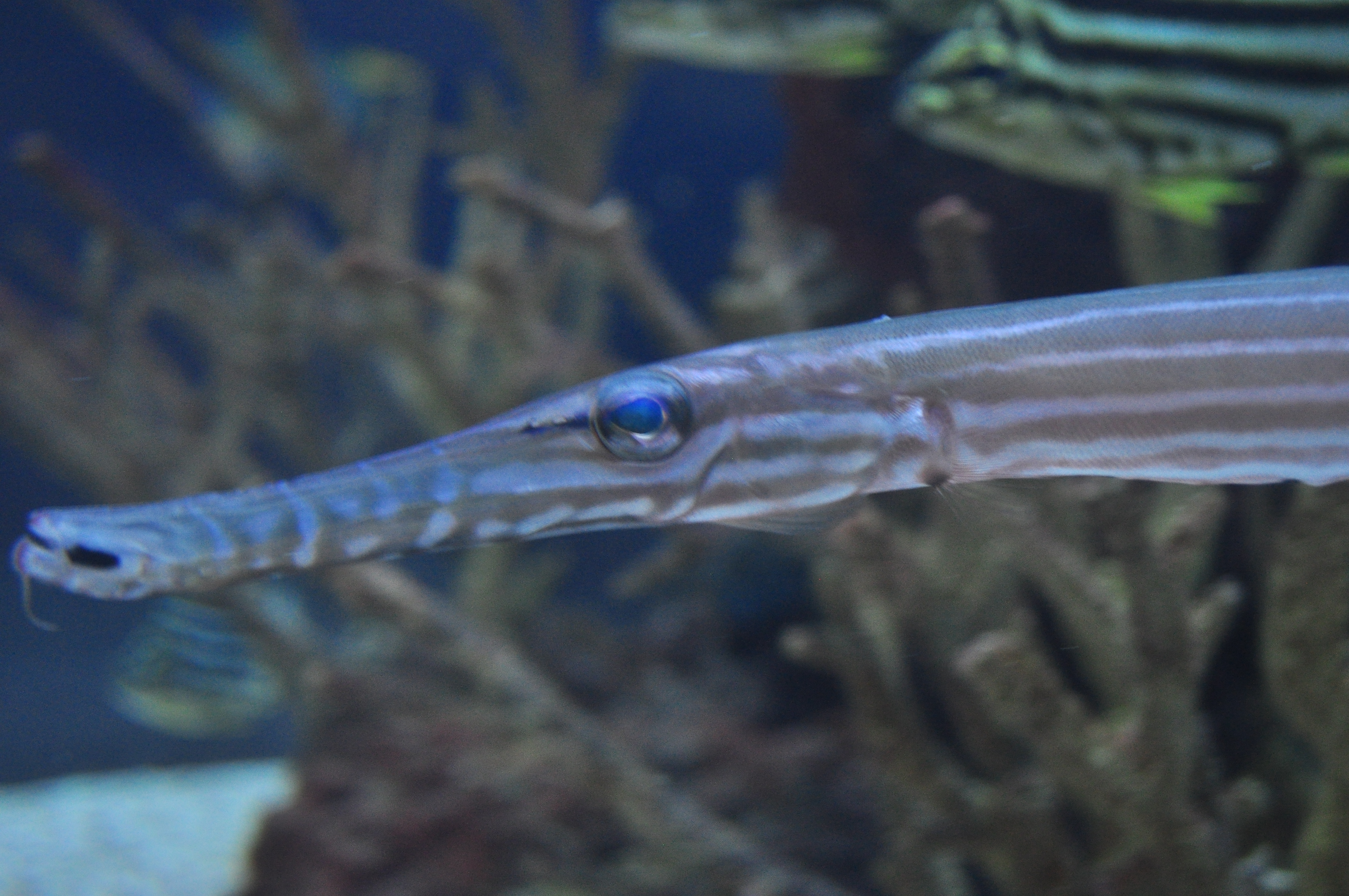 Seattle Aquarium 082 - Tropical Pacific